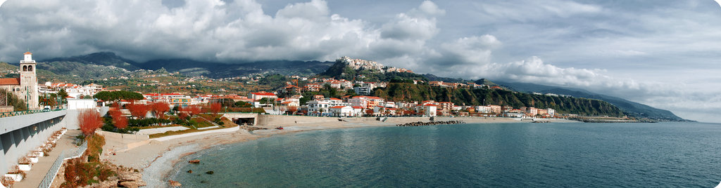 Descrizione: panoramica di Belvedere Marittimo (Cs) Data: 27 Gennaio 2880, 3:09:15 PM Fonte: opera propria Autore: Valentina Blasi (io) Detentore copyright: Valentina Blasi (io) Licenza